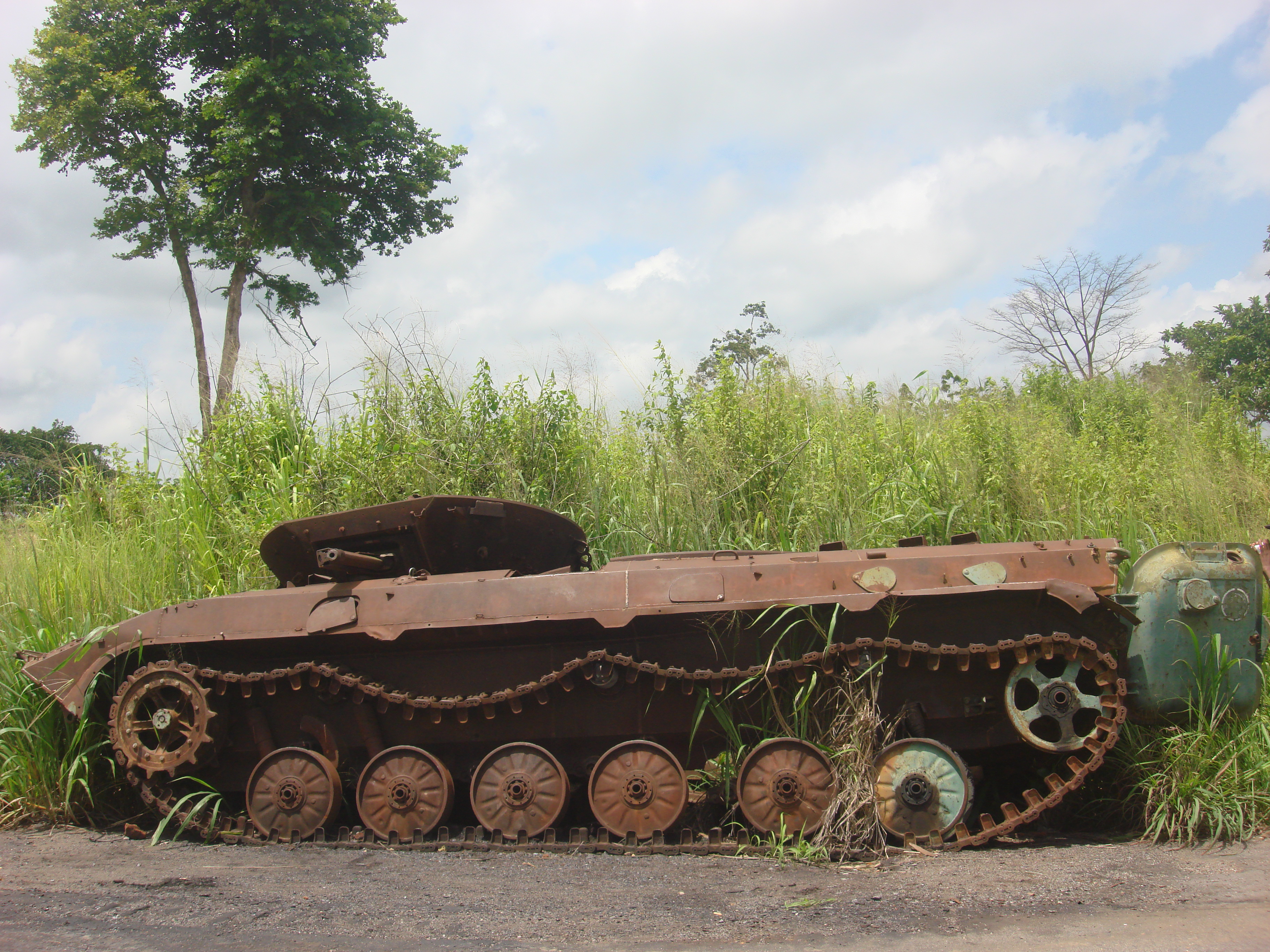 Vestiges d'un transport de troupes blindés BMP-1 ou -2 des Forces armées nationales de Côte d'Ivoire (FANCI) près Bonoufla (Vavoua, centre-ouest de la Côte d'Ivoire)